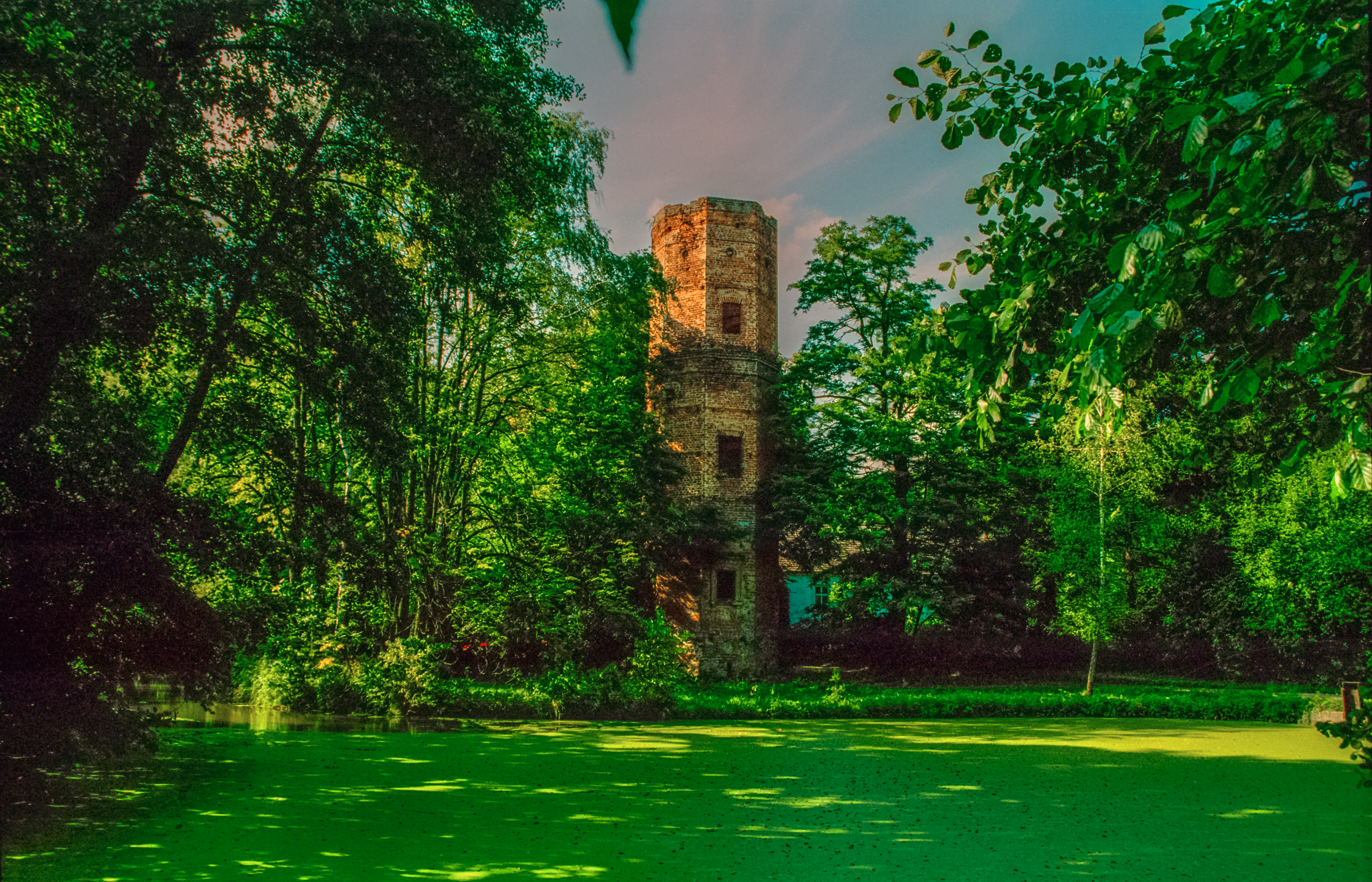 Poland, Wyszyna Castle